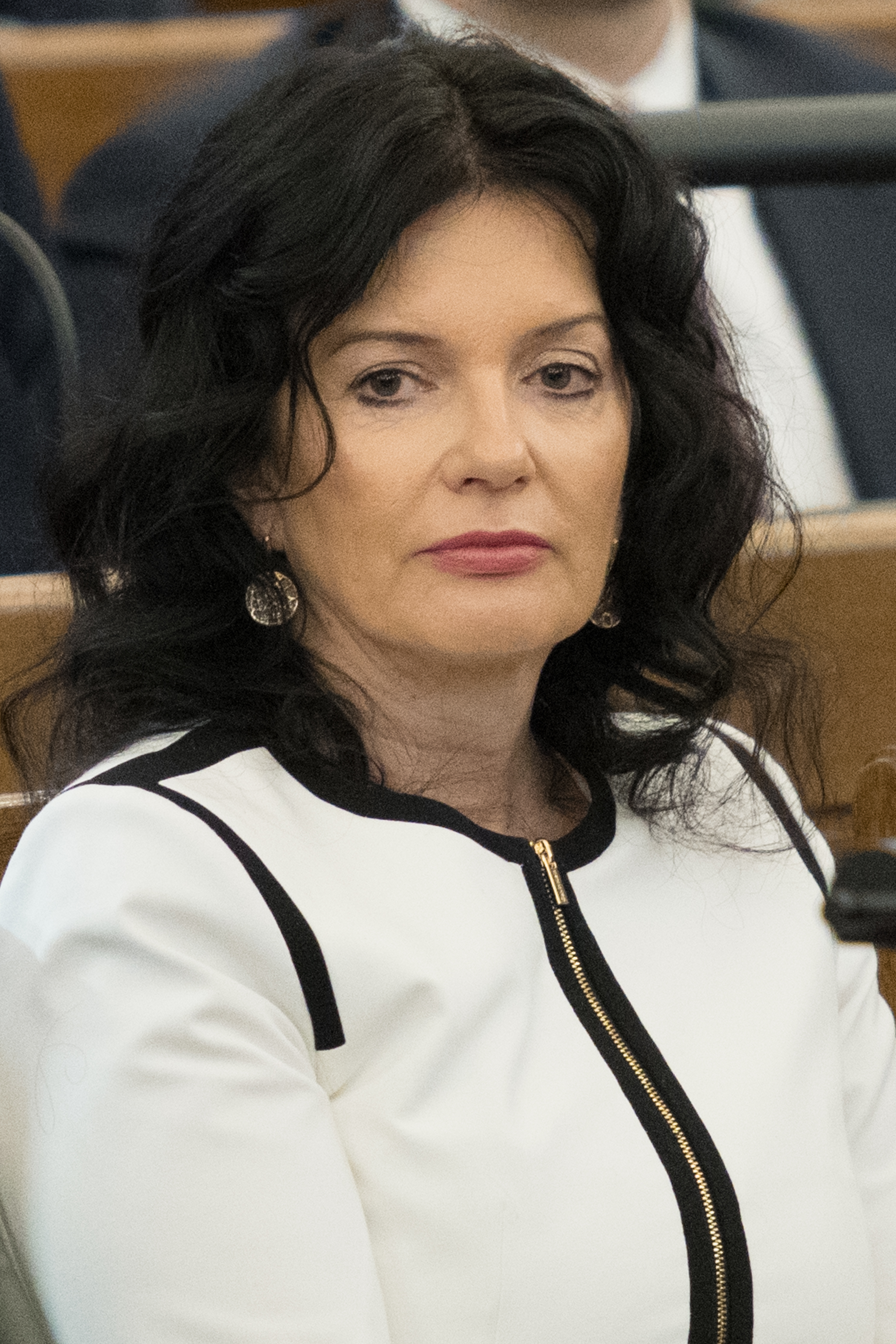 2019.gada 23.janvāris. Krišjāņa Kariņa valdības apstiprināšana Saeimas ārkārtas sēdē. Foto: Ieva Ābele, Saeima Izmantošanas noteikumi: saeima.lv/lv/autortiesibas